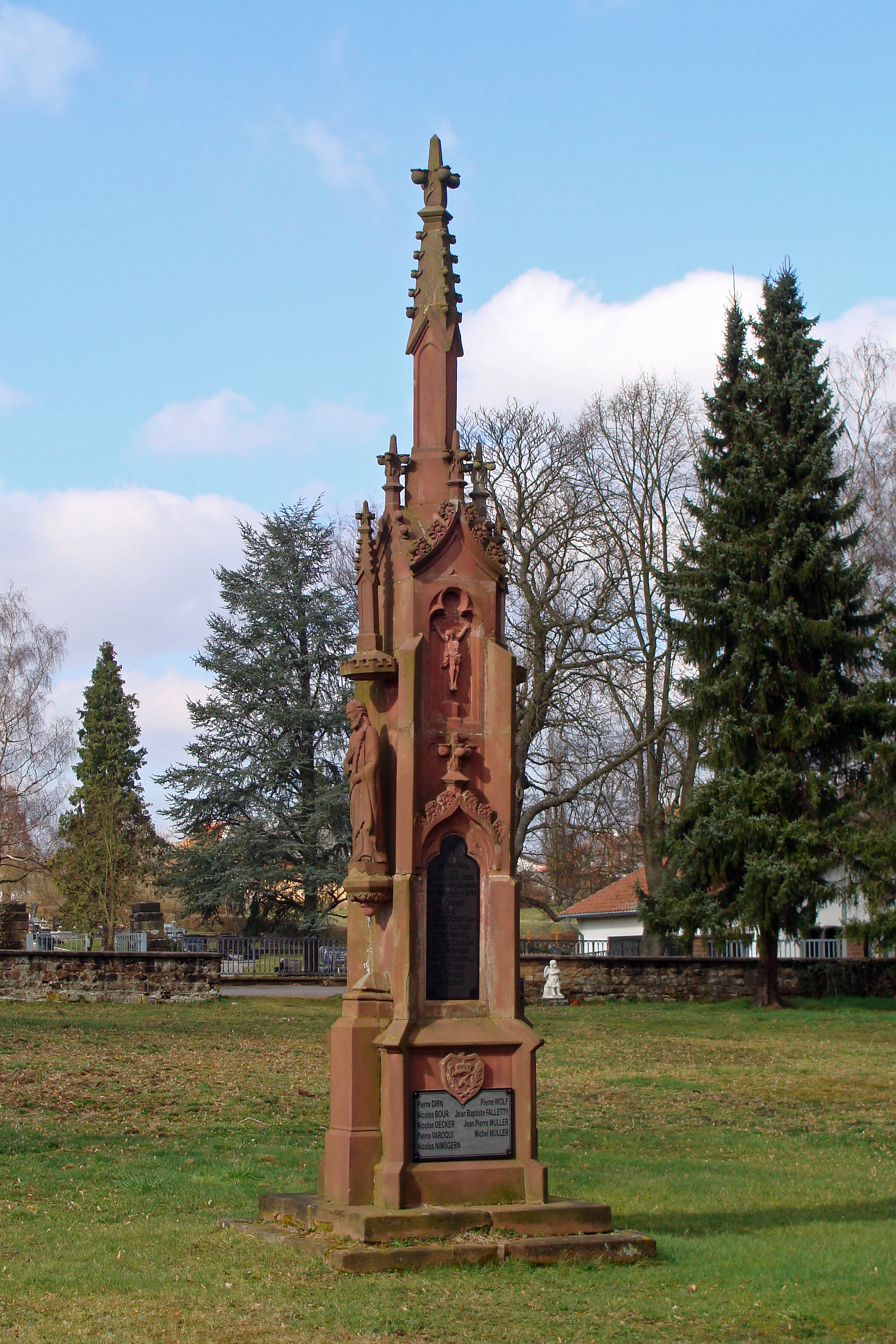 Monument érigé à Lauterbach (commune de Völklingen) en Sarre, en mémoire de la catastrophe minière du 5 juillet 1876 survenue dans la mine de L'Hôpital (Moselle). L'Hôpital se nommait alors Spittel. Une explosion tua 35 mineurs sur le coup. 42 mineurs décèderont dont 26 mineurs originaires de Lauterbach (en Sarre). Il y aura en plus près de 50 blessés.